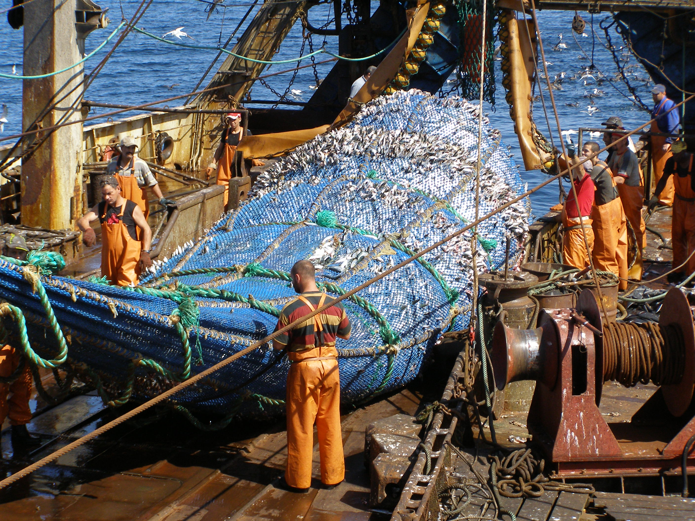 la capture des poissons « bleus » par un chalutier.